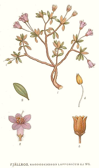 Original Description Fjällros, Rhododendron lapponicum (L.) Wg.